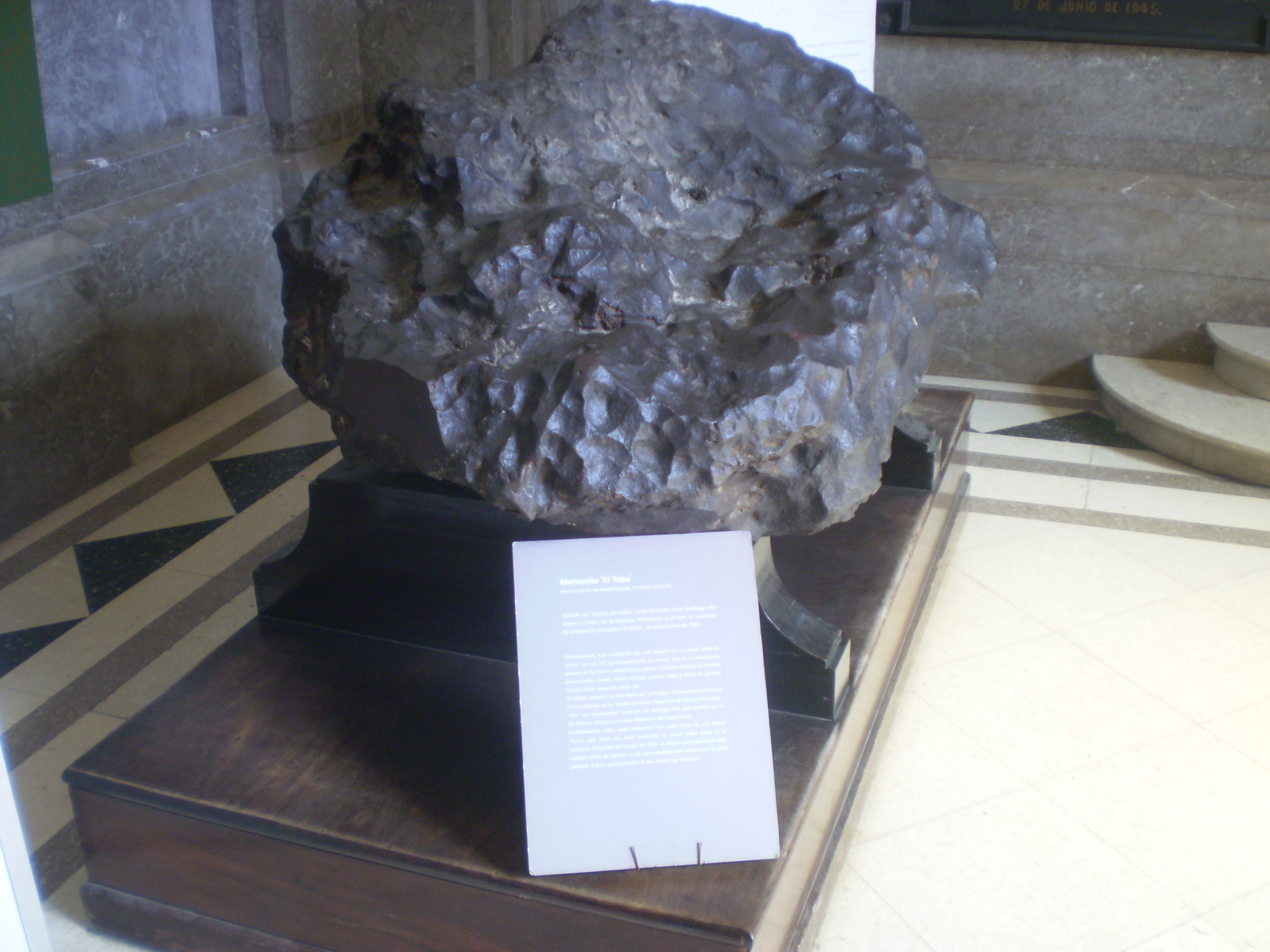 El Toba meteorite, a synonym for Campo del Cielo. Museo Argentino de Ciencias Naturales "Bernardino Rivadavia".